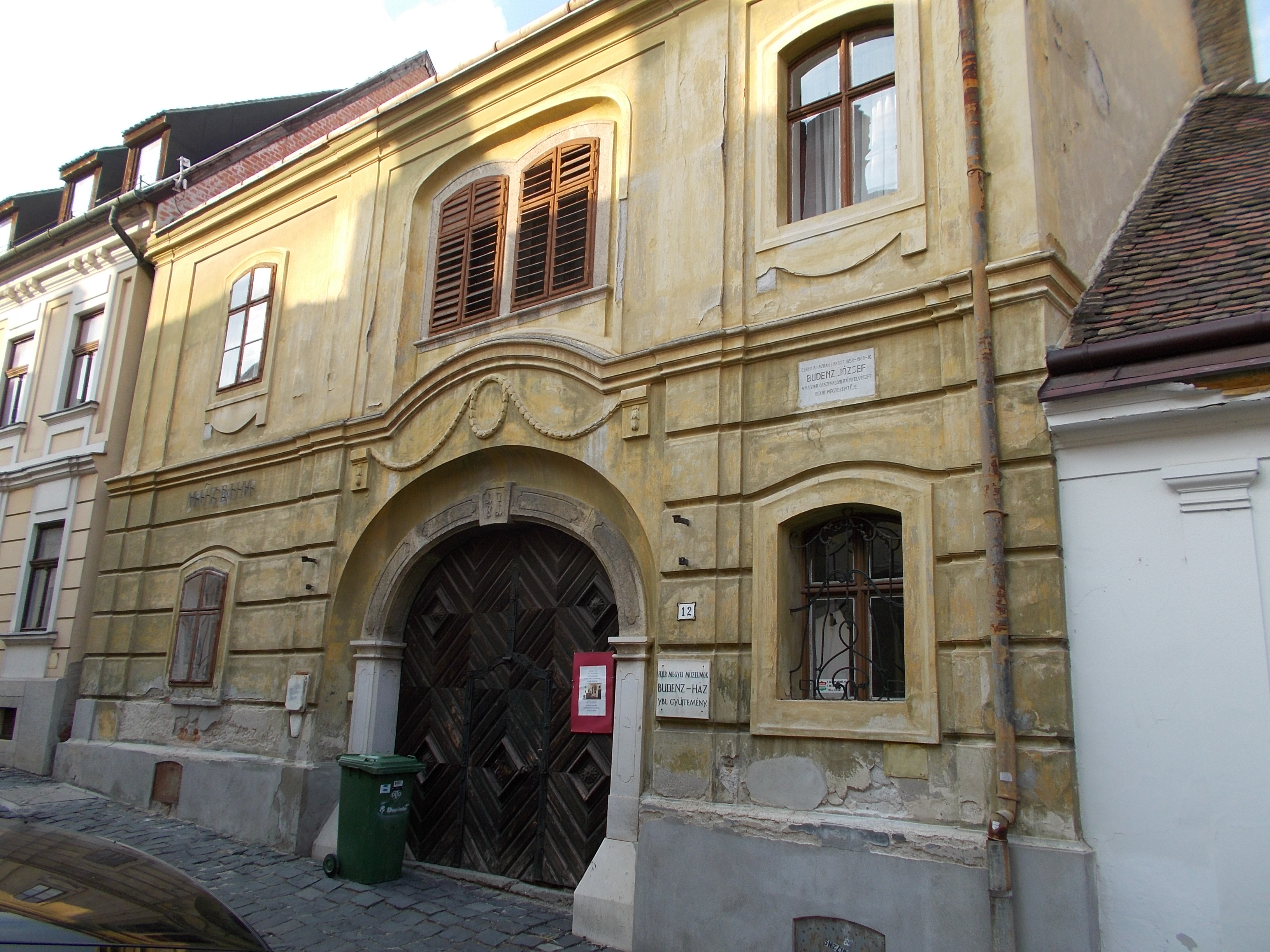 Budenz-ház, Ybl múzeum. Műemlék ID 3814. Épült 1781.Utcasorba illeszkedő, zártsorú beépítésű, U alaprajzú, egyemeletes, későbarokk (copf) lakóépület. - Magyarország, Fejér megye, Székesfehérvár, Belváros, Arany János u. 12. This is a photo of a monument in Hungary, Identifier: 3814